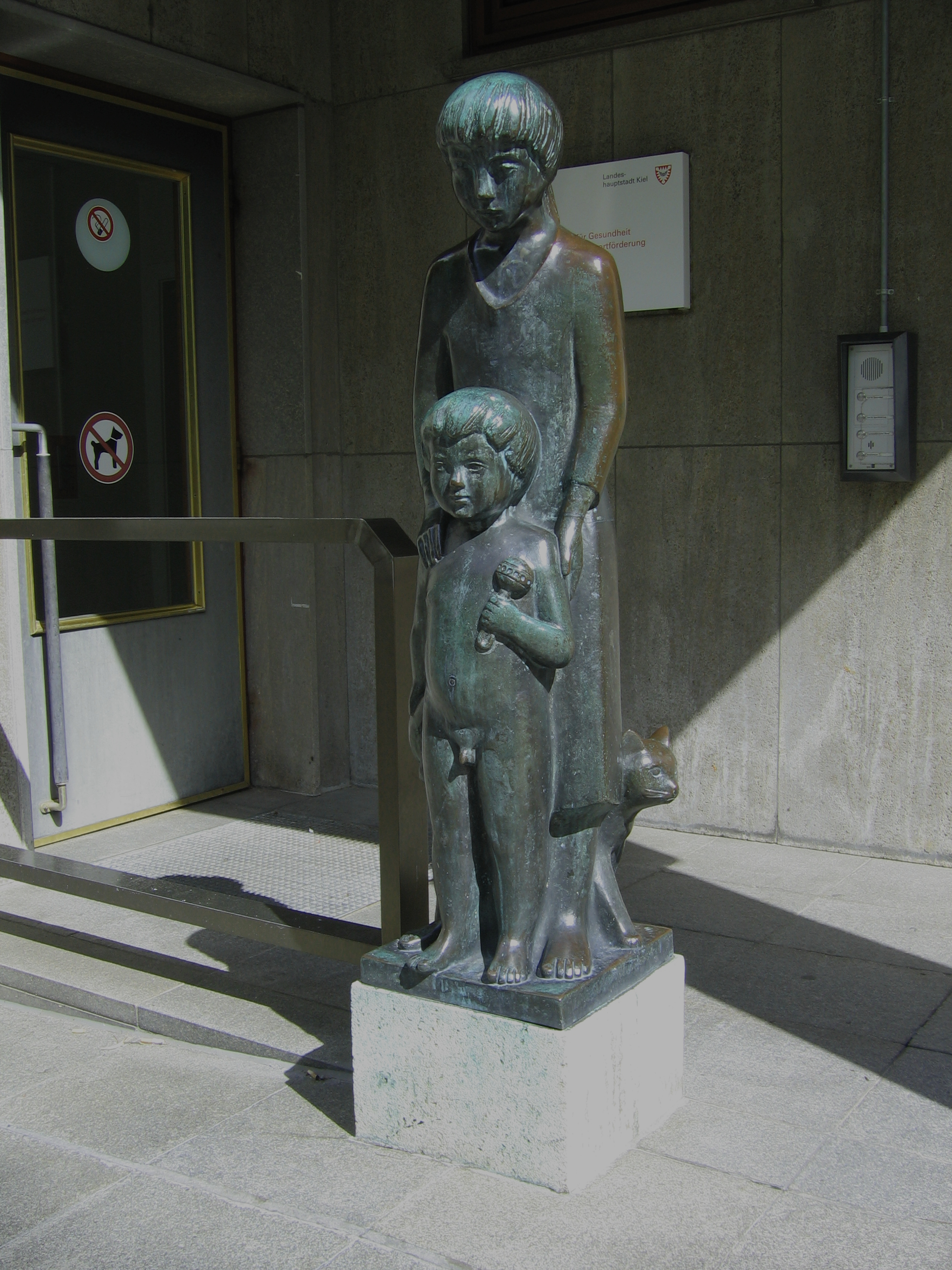 »Zwei Kinder mit Kater«. Bronzeplastik von Fritz During vor dem Kieler Gesundheitsamt